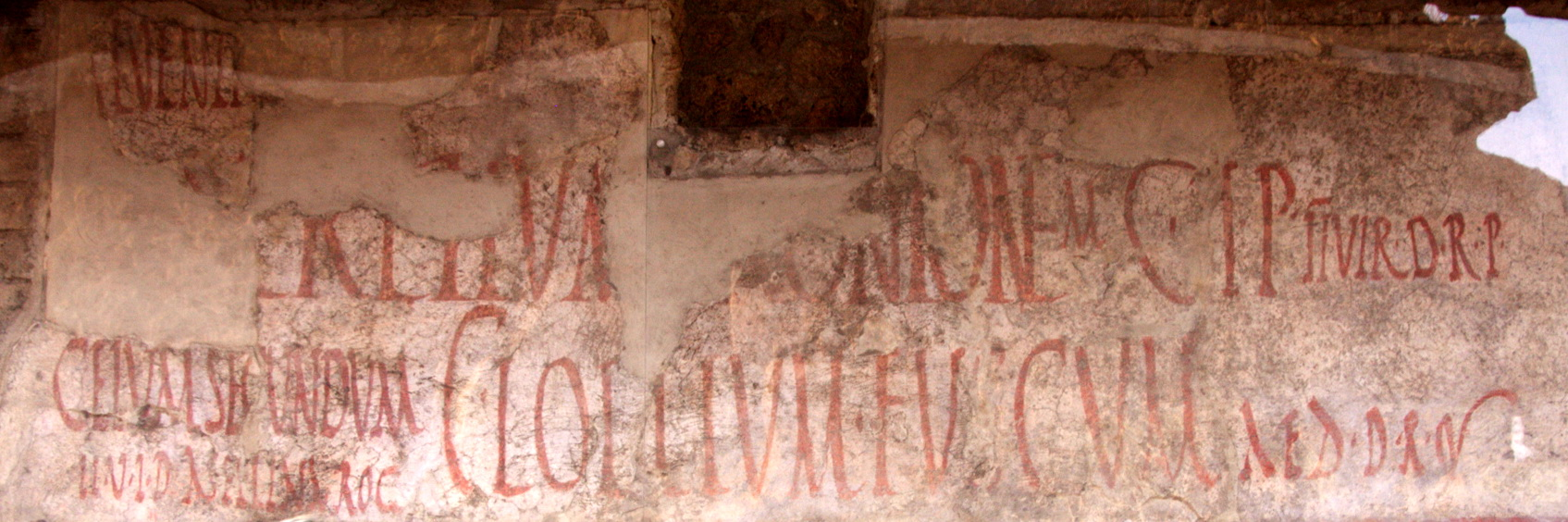 Inscripció electoral a la Casa de Julio Polibioa a la via de l'Abundància de Pompeia (any 79)